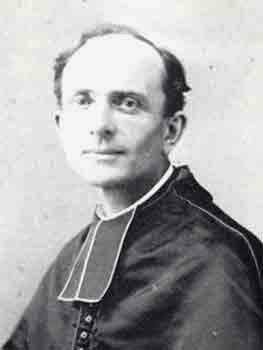 Elphège Vacandard,(1849-1927), est un prêtre catholique français historien de la religion spécialiste de Bernard de Clairvaux